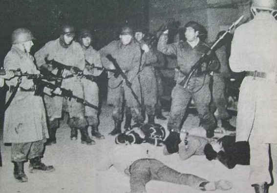 Manifestantes reducidos por las fuerzas militares en la localidad de General Roca, provincia de Río Negro, Argentina, durante la insurrección conocida como "Rocazo".